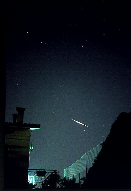 Iridium-Flare aufgenommen am 22. August 1998 in Pacengo am Gardasee mit einer Belichtungszeit von mehreren Sekunden und einem Normalobjektiv (f = 50mm). Die Leuchterscheinung erreichte eine Helligkeit von -5 mag, was etwa der der Venus unter optimalen Bedingungen entspricht. Es sind Teile der Sternbilder von Stier (links oben), Walfisch (rechts oben) und Eridanus (unten) zu sehen. Der Satellit passiert knapp oberhalb des Sterns δ Eridani.